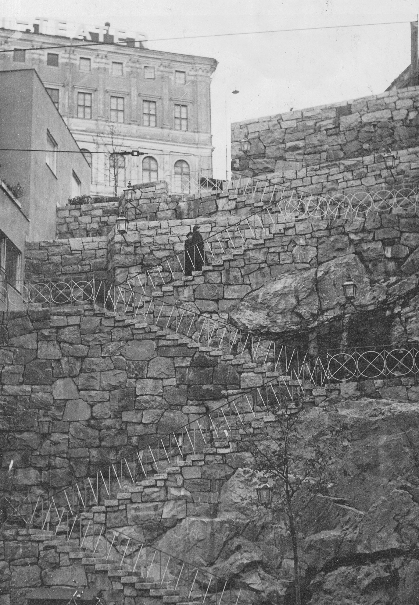 Från Katarinavägen leder den nya trappan till Mosebacke tog